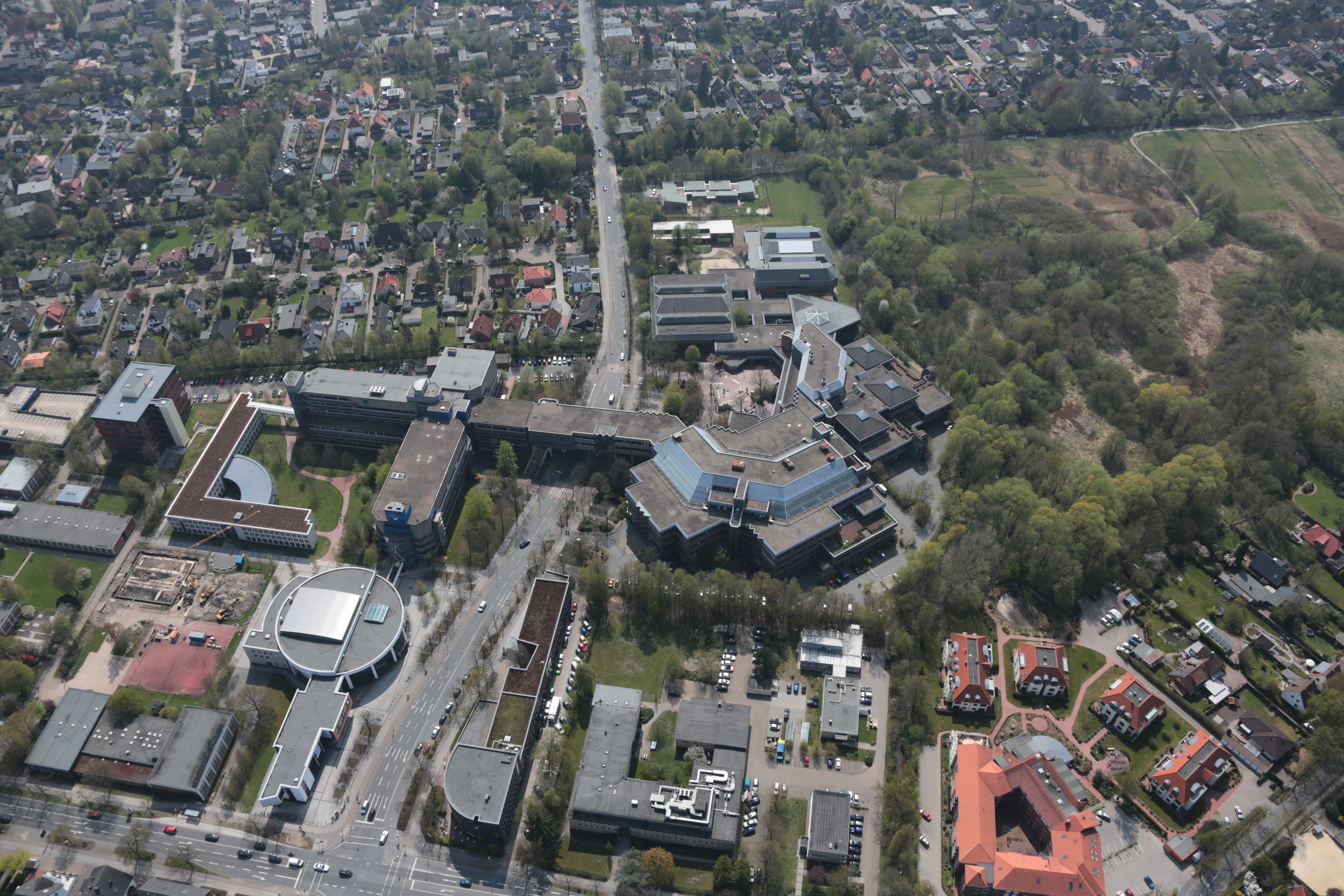 Fotoflug von Nordholz-Spieka nach Oldenburg und Papenburg